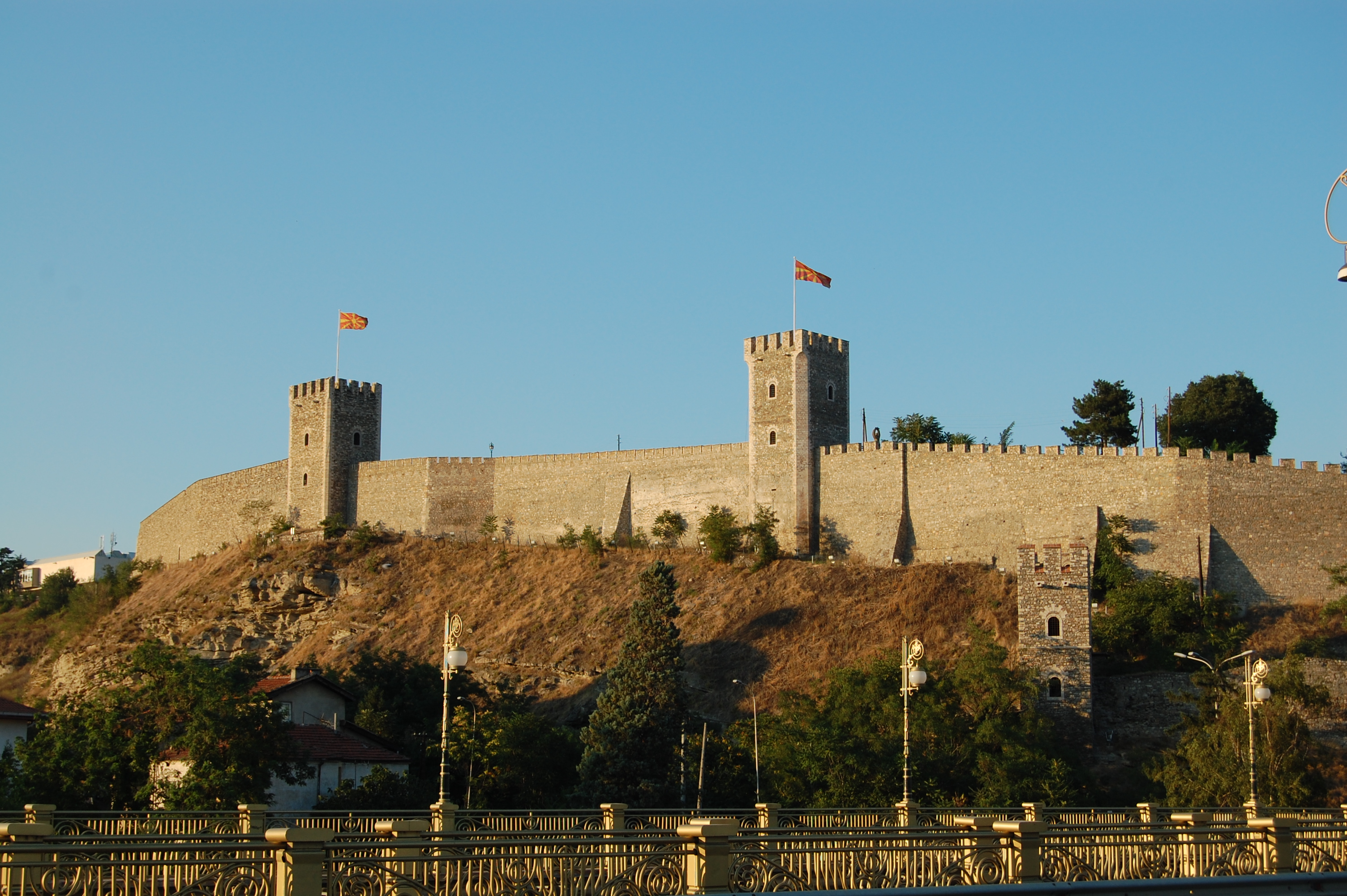 Skopje, Macedonia